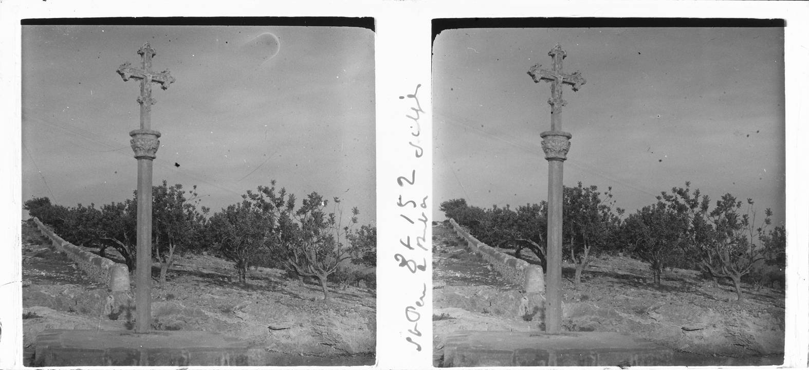 Creu de Sant Pere de Ribes. Josep Salvany i Blanch (1914)